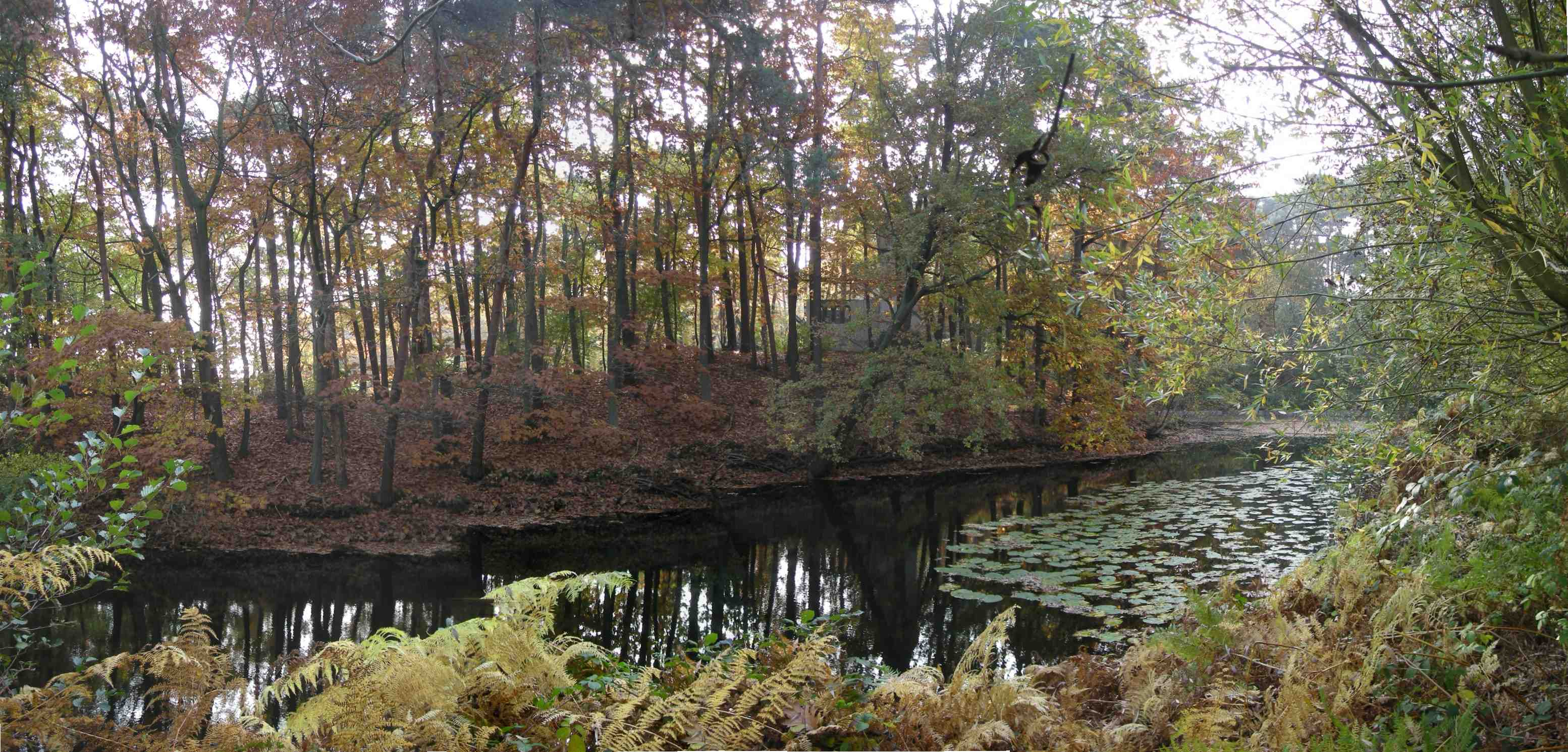 Fort Sint-Jan bij Trompwal (‘De Wal’). Van dit fort blijft enkel nog de herkenbare vorm over die we terugvinden in begroeide omwalling en de gracht. Het fort Sint-Jan bestond zeker al in 1590 aangezien het toen belegerd werd door Staatse troepen. (Vermoedelijk werd het opgericht in 1584 in opdracht van de Spaanse veldheer Alexander Farnese, landvoogd van de Nederlanden tussen 1578 en 1592). In het begin van de 18de eeuw was het vernieuwde fort één van de steunpunten van de Bedmarlinie. De Stroperstraat (N403) doorklieft het voormalig fort Sint-Jan.